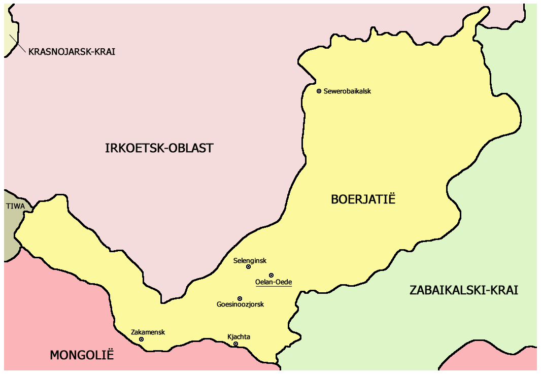 Kaart van Boerjatië in Rusland